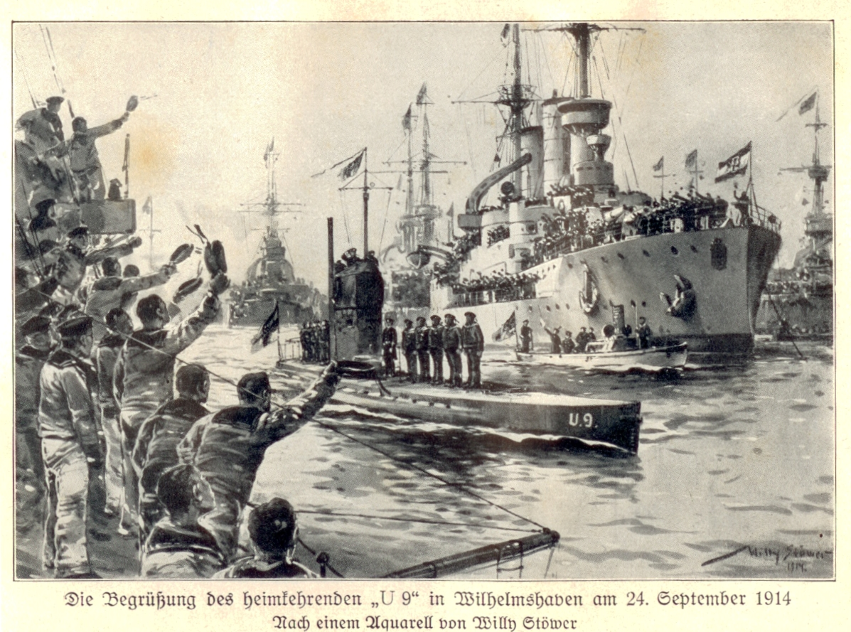 U9 Heimkehr.jpg